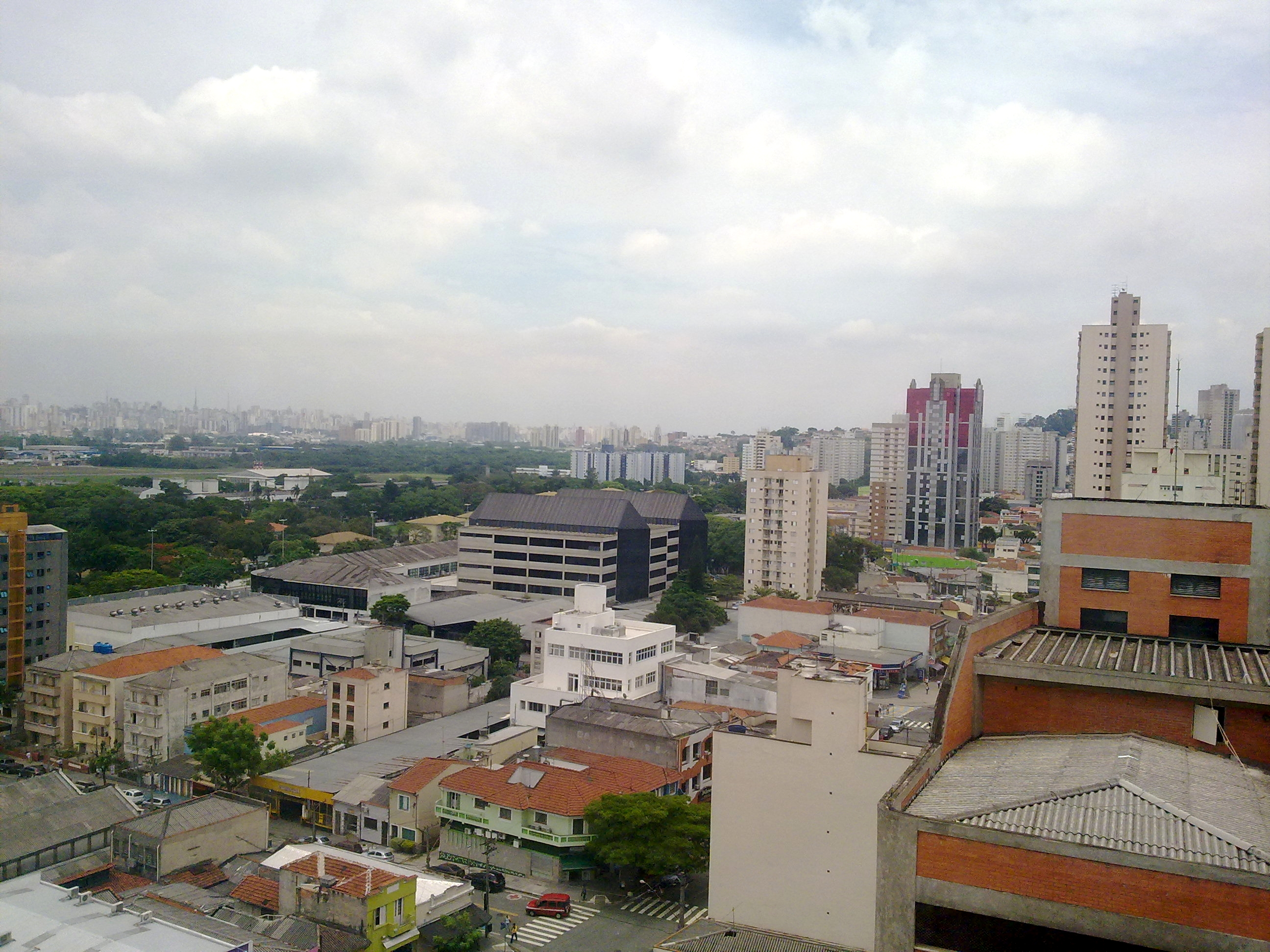 Arredores do Aeroporto Campo de Marte, Santana, SÃO PAULO, BRASIL